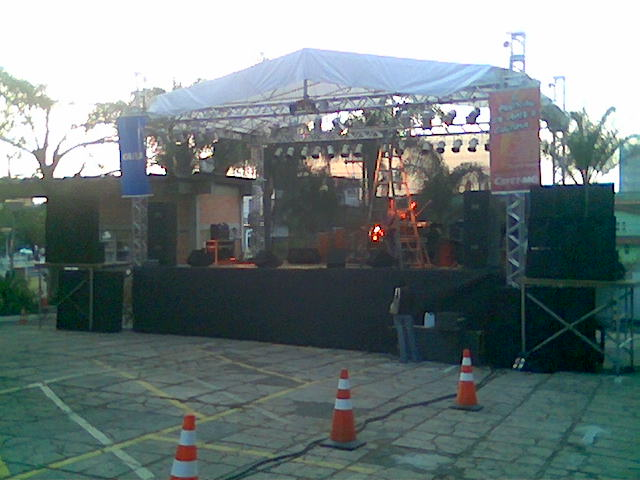 Palco montado no campus I do Centro Federal de Educação Tecnológica de Minas Gerais para o festival de música de calouros, com a participação de Seargent Peppers, Os Caramujos e a Banda Oficial do Cefet-MG.